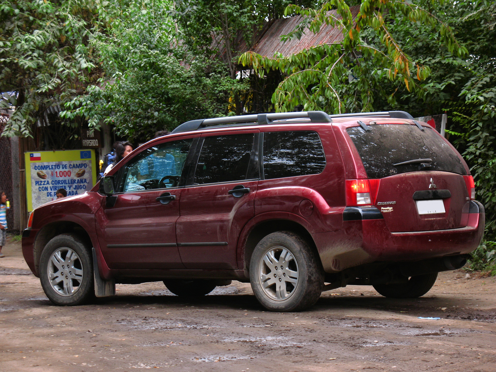 Mitsubishi Endeavor V6 2004